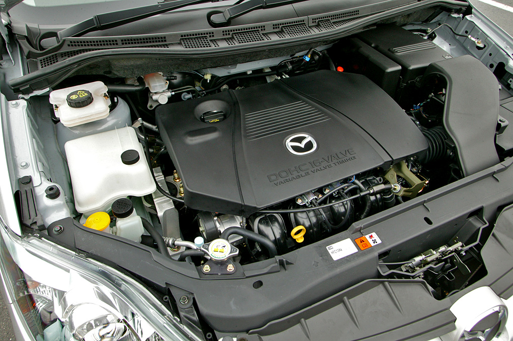 Mazda L3-VE I4 2.3L Variable Valve Timing engine